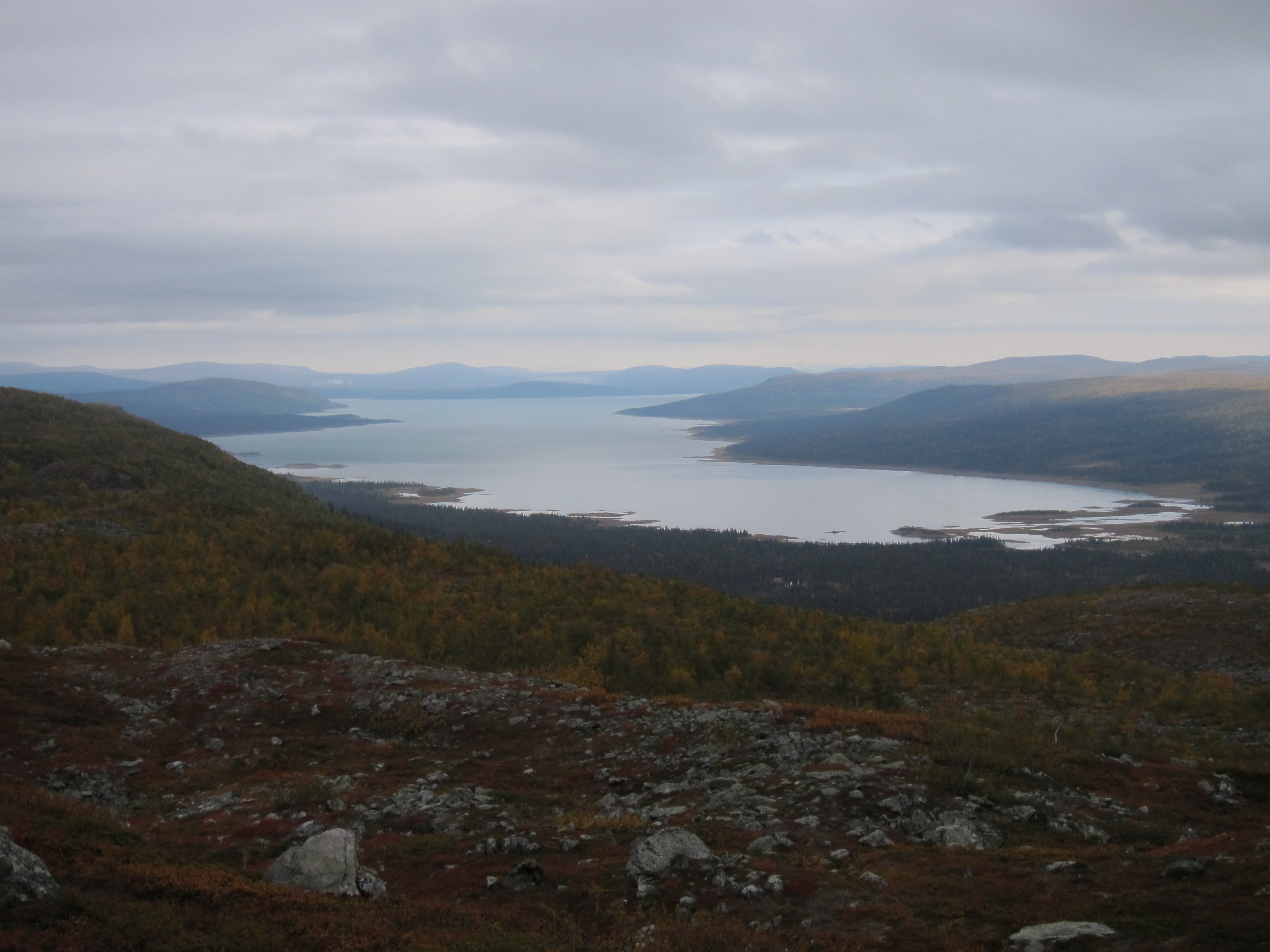 Sjön Tjaktjajaure sett från Kungsleden.